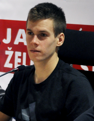 Richard Varga